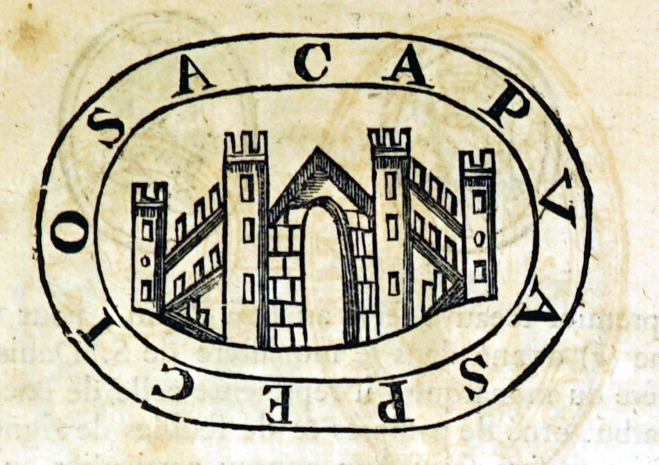 image venant de "Nouveau traité de diplomatique...".